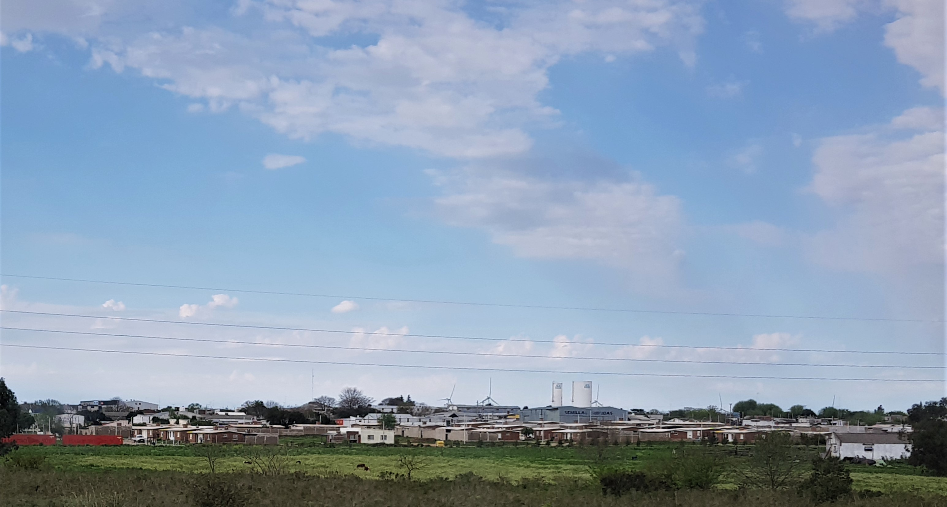 Vista de la ciudad de Libertad desde la ruta 1 en setiembre de 2018